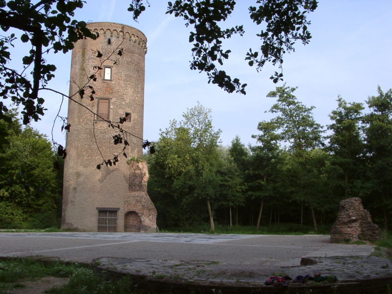 Ruine der Burg Uda in Grefrath, Deutschland This image shows a heritage building in Germany, located in the North Rhine-Westphalian city Grefrath (no. Oe 18).